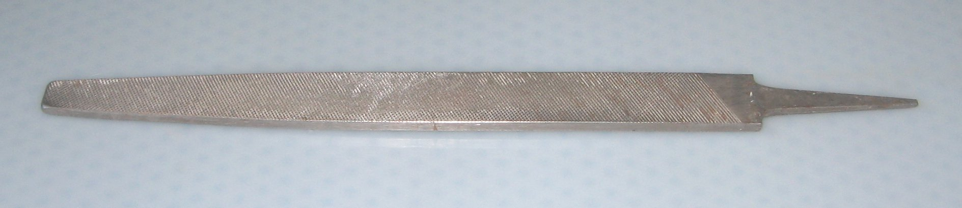 Ebena fajlo La foto estis farita de mi mem.